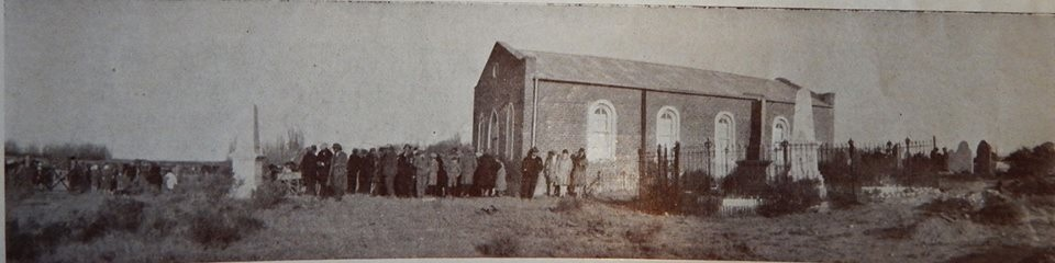 Capilla Moriah en Trelew, el 28 de julio de 1929, celebración galesa